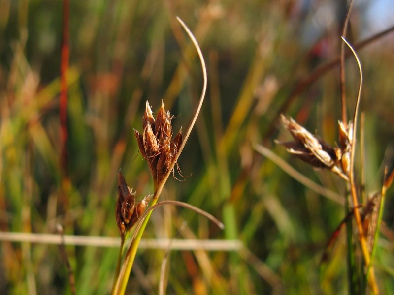 Braunes Schnabelried (Rhynchospora fusca), fruchtend